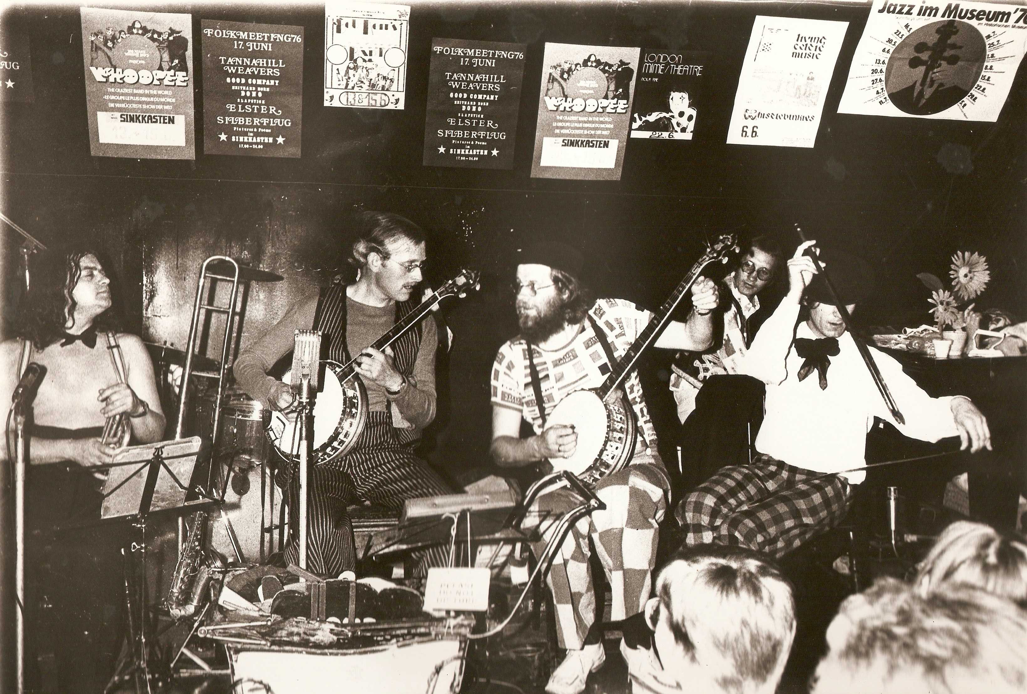 1972 im Sinkkasten, Mainstrasse 2